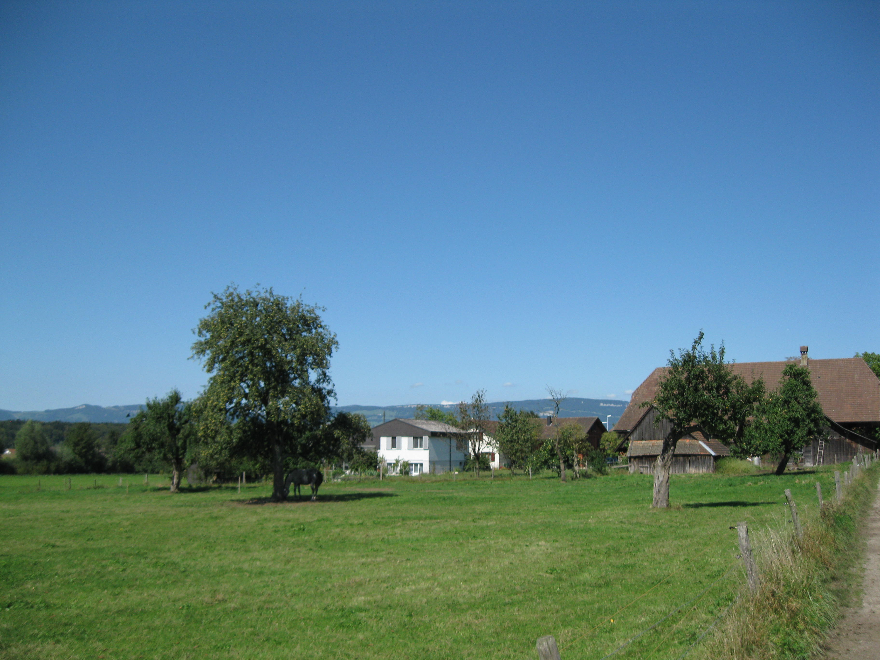 Richtung Niederönz Jura